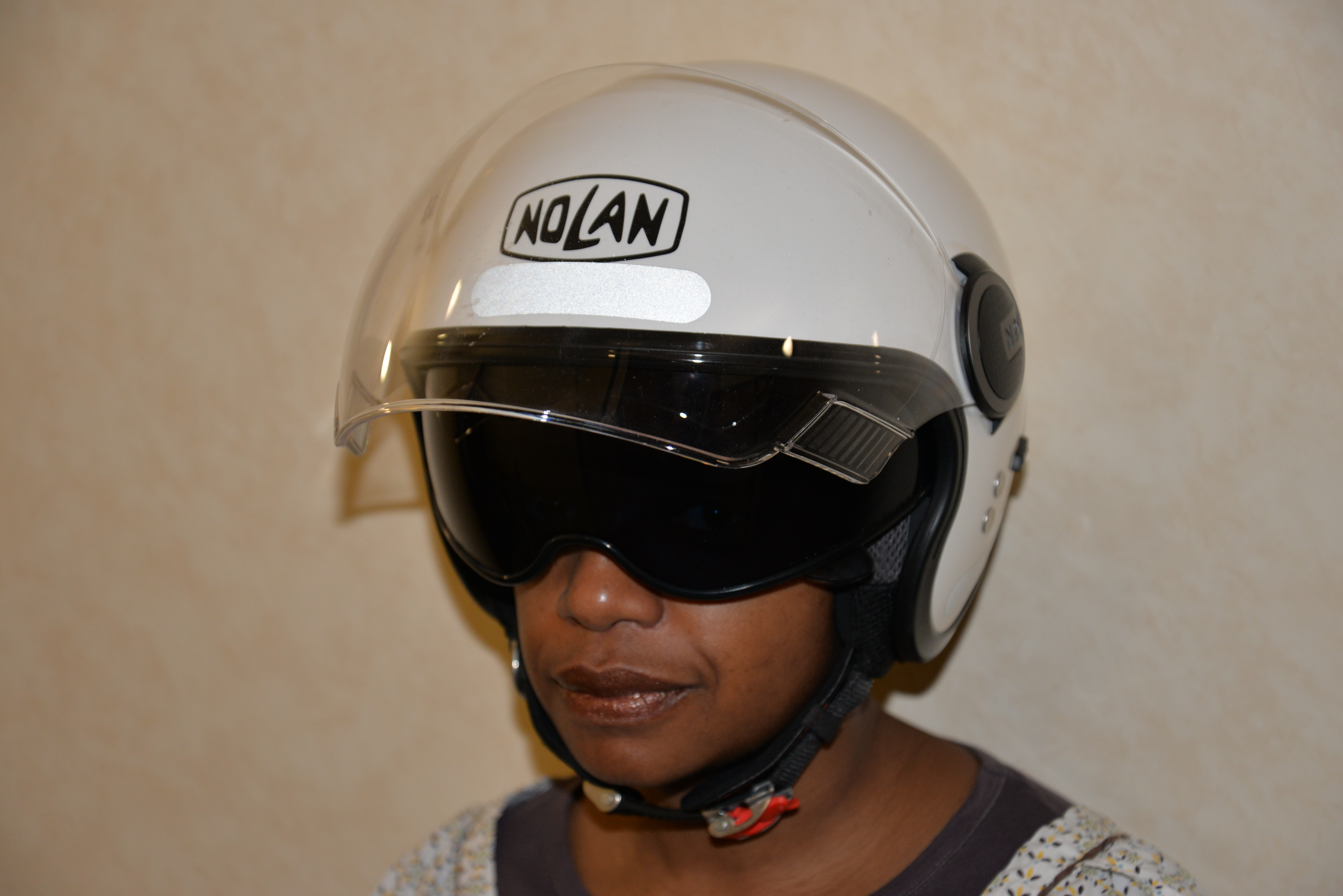 Casco Nolan N21 Visor.